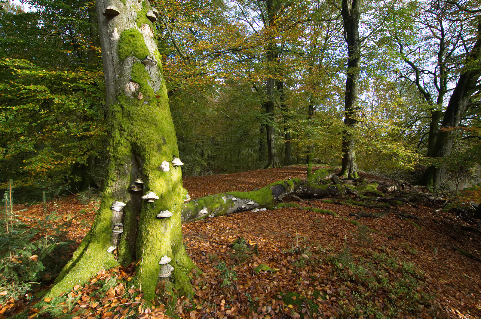 Dødt ved med svampe i Velling Skov.